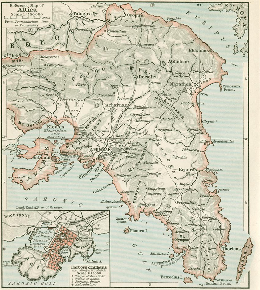 Sezione della mappa File:Shepherd-c-016.jpg